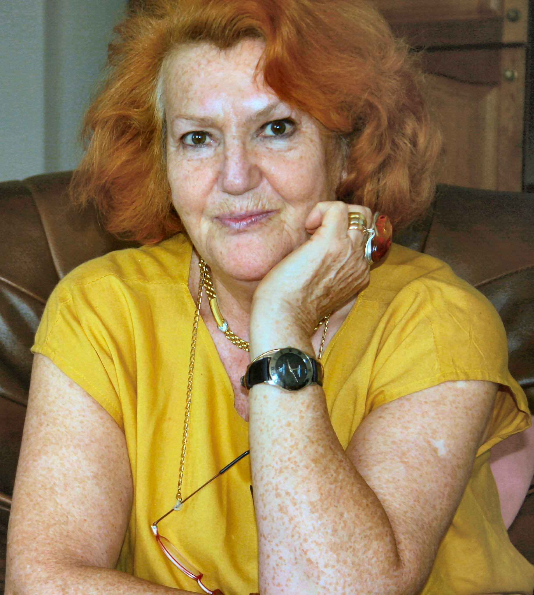 la scrittrice vicentina Annarosa Dal Maso